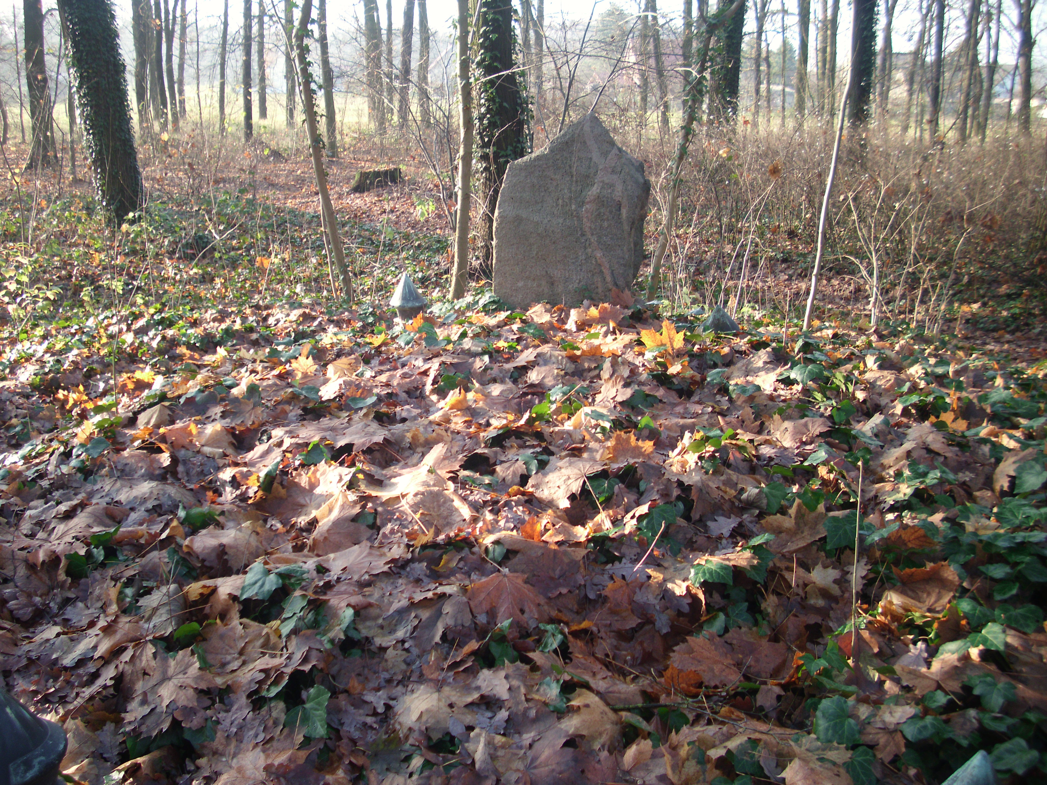 Grabstätte der Gutsbesitzer im Park Krügersdorf, Beeskow, Brandenburg